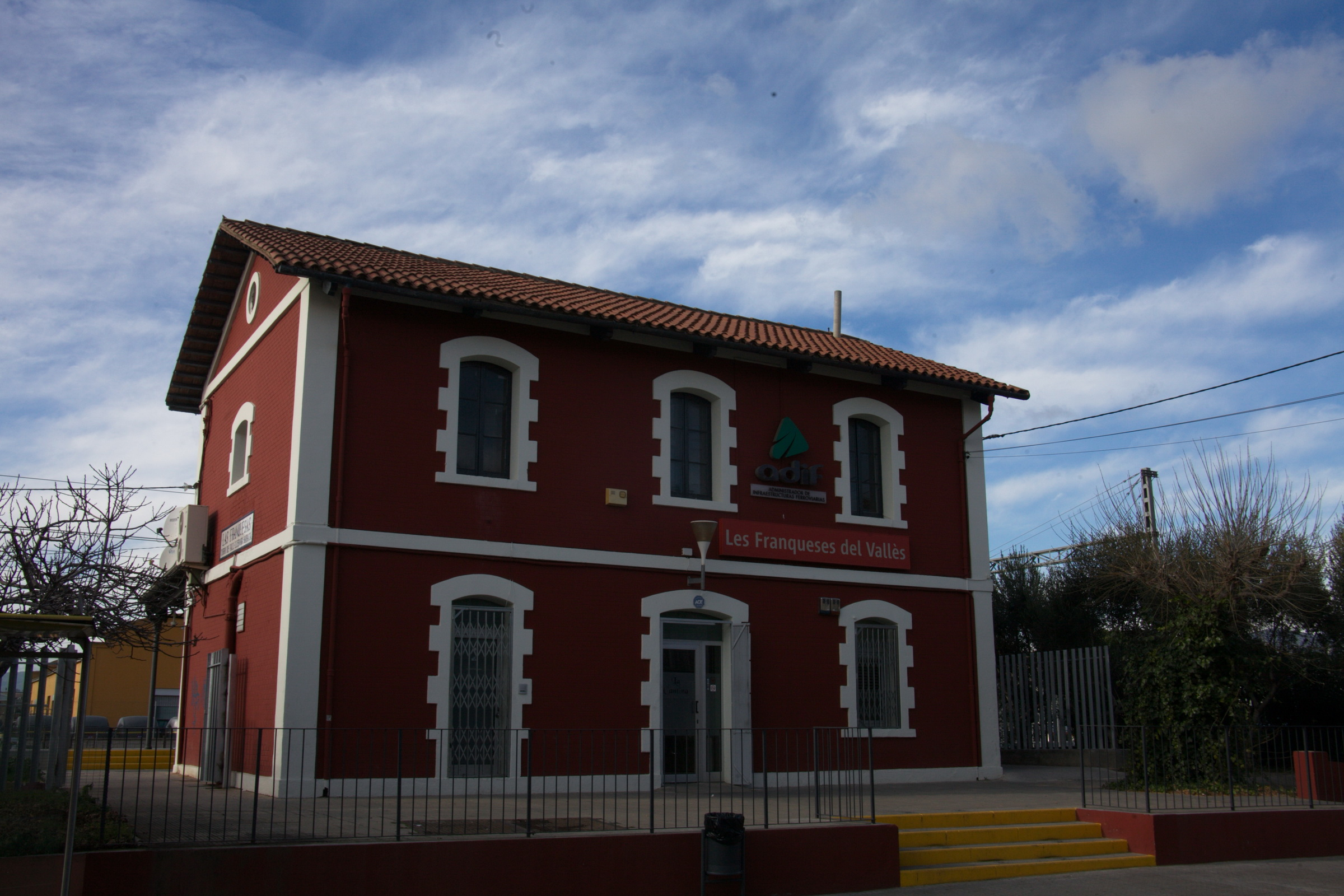 Estació de ferrocarril de Les Franqueses (Vallès Oriental, Catalunya). Línia R3. NO CONFONDRE amb Les Franqueses-Granollers Nord train station